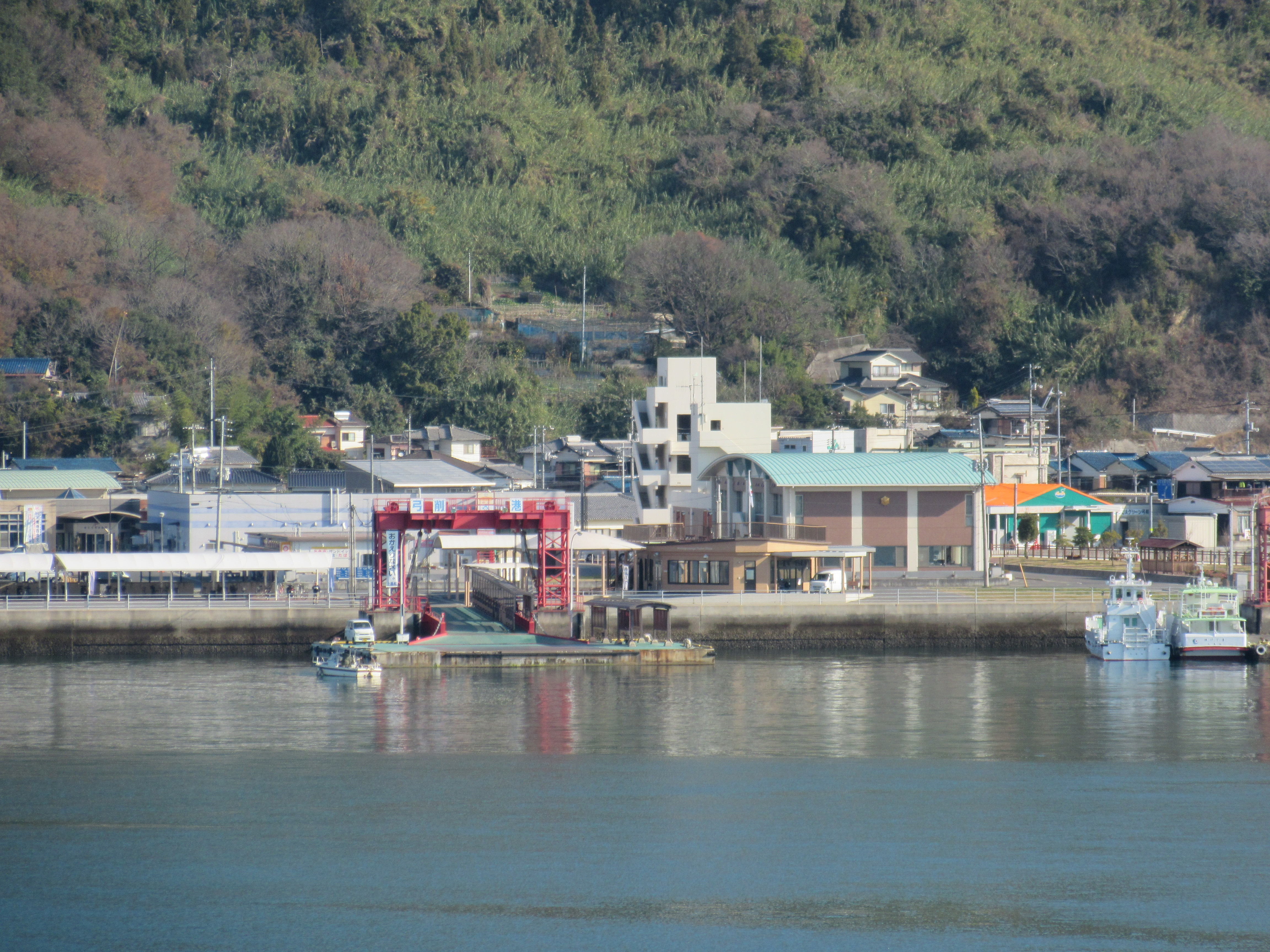 弓削港全景